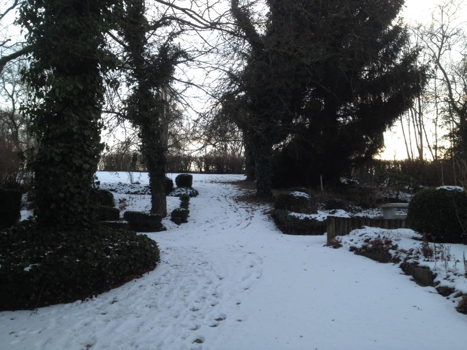 Alter Friedhof in Obersontheim. Foto: Zzumwwald.